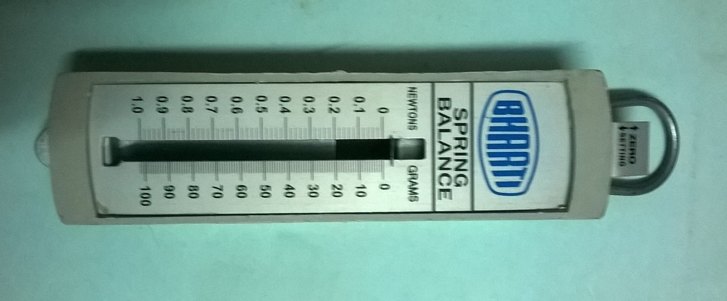 స్ప్రింగు త్రాసు